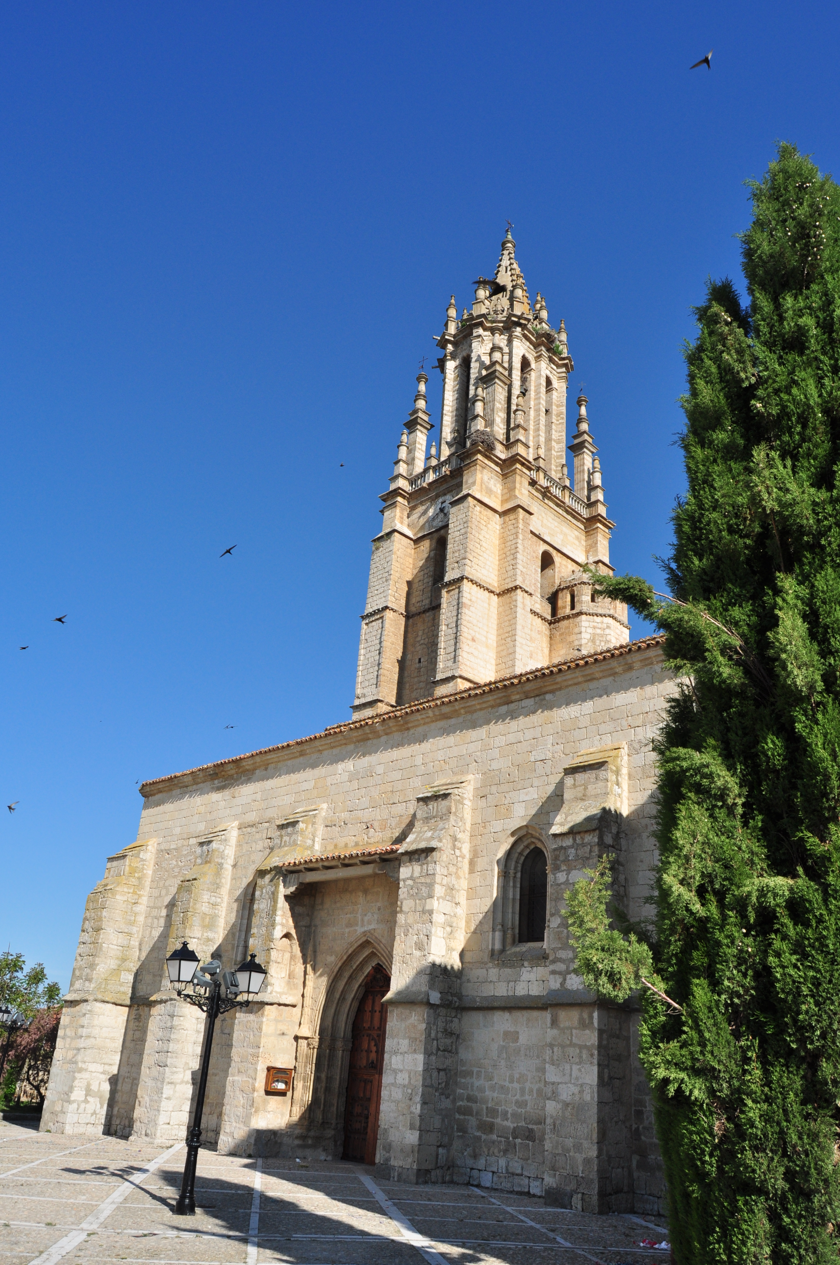 Ampudia - 016